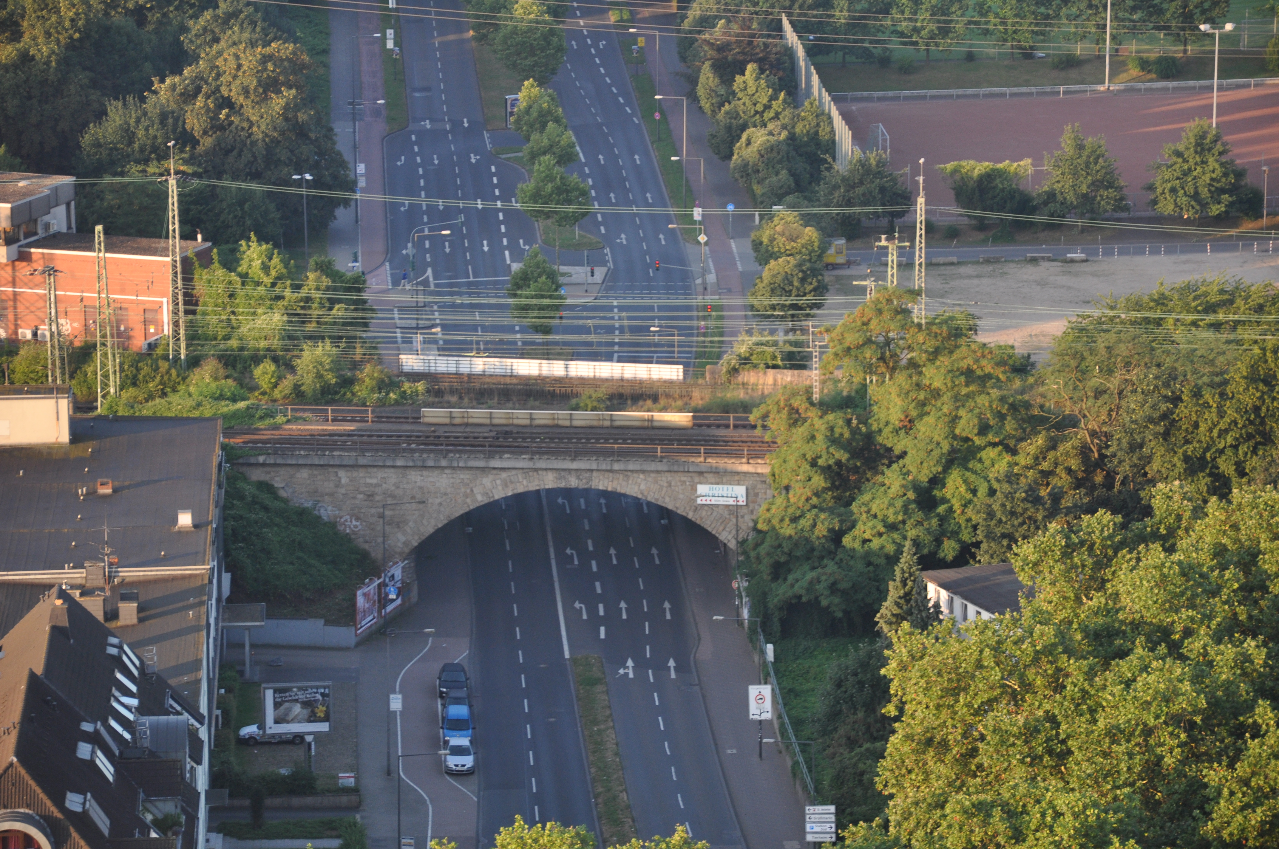 Ballonfahrt Köln. Eisenbahnüberführung an der Vorgebirgsstraße.